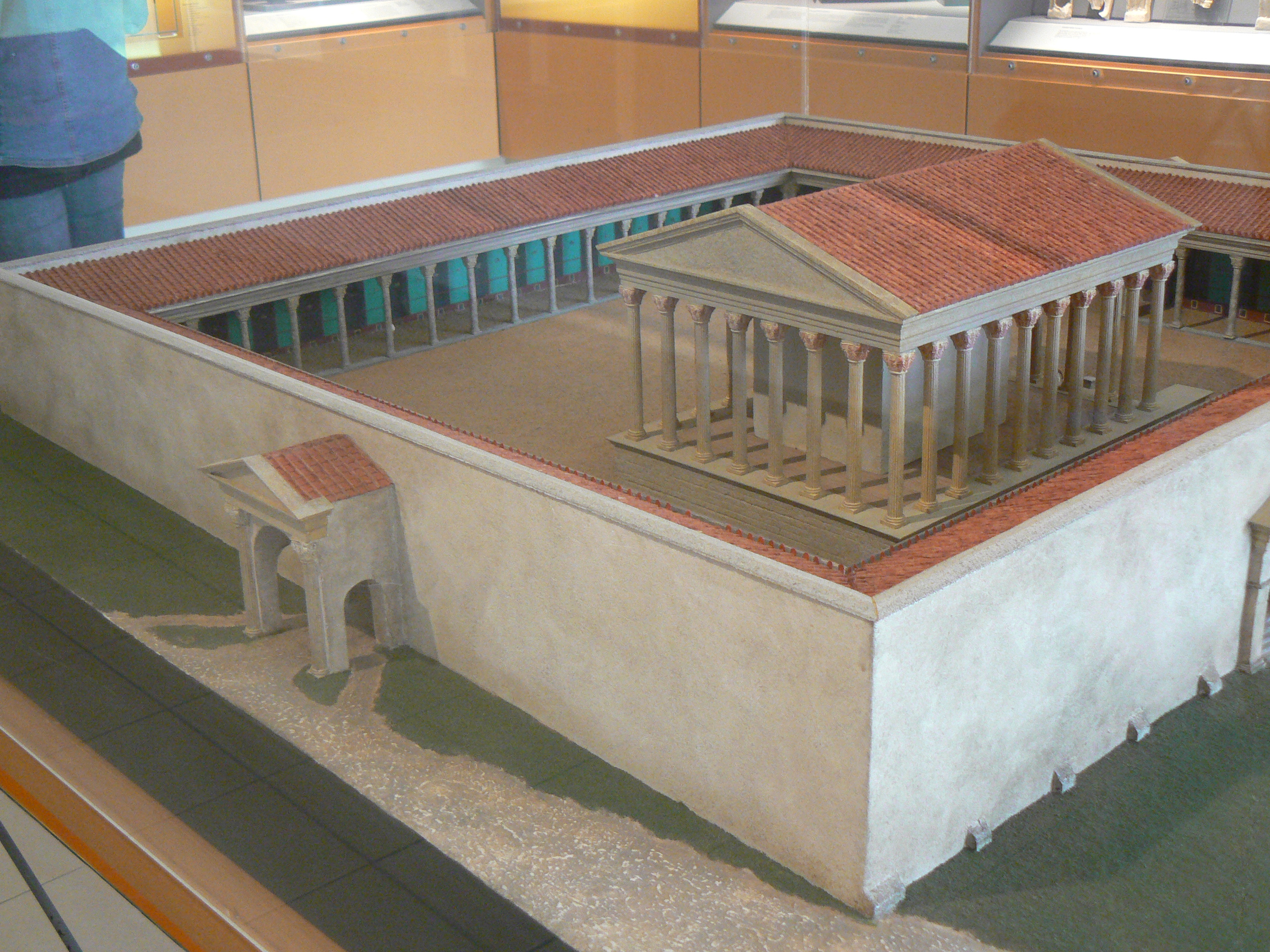 Maquette du sanctuaire romain de Jublains, Mayenne, située au musée archéologique de cette commune.